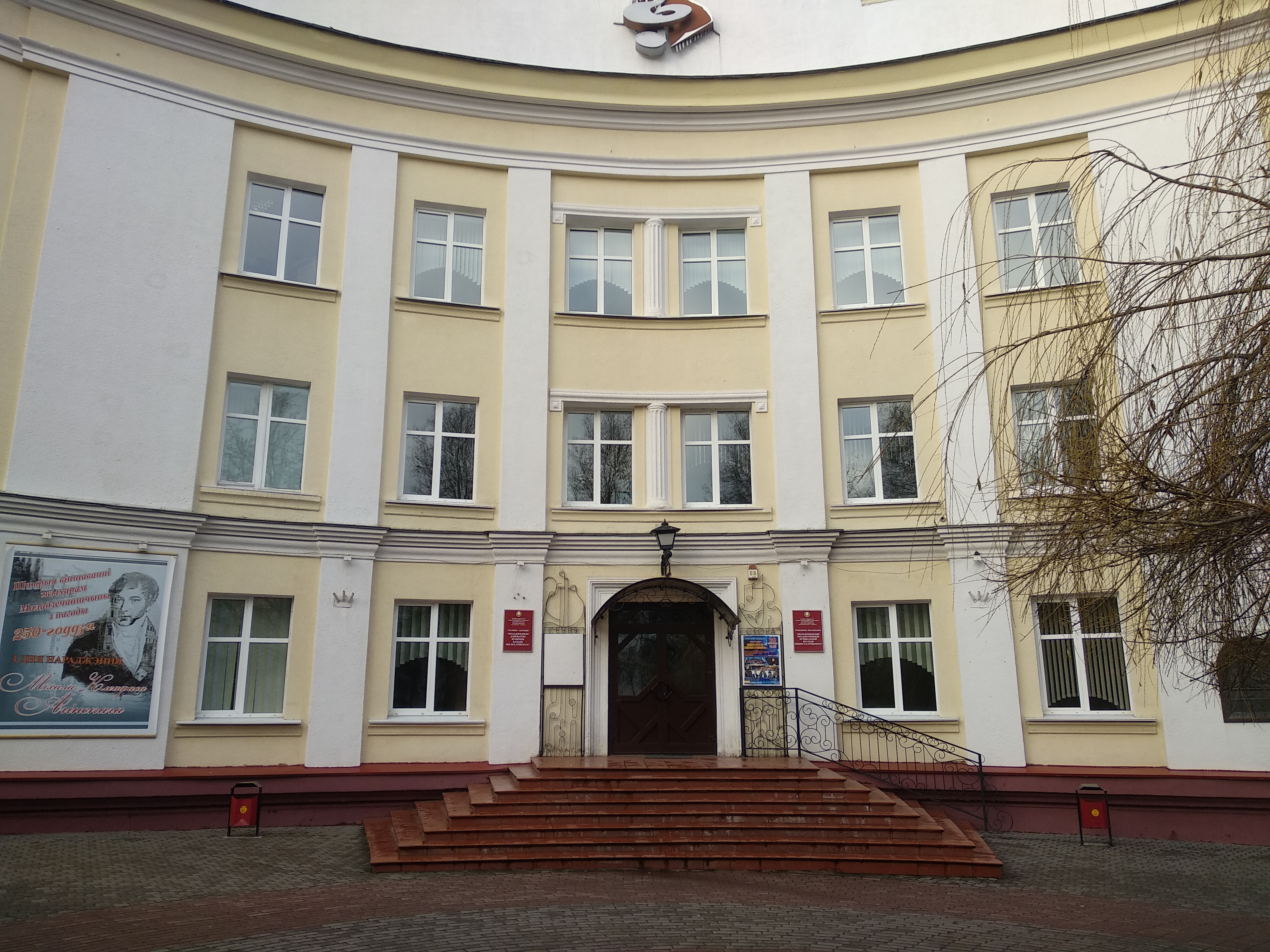 Maladzechna, Belarus